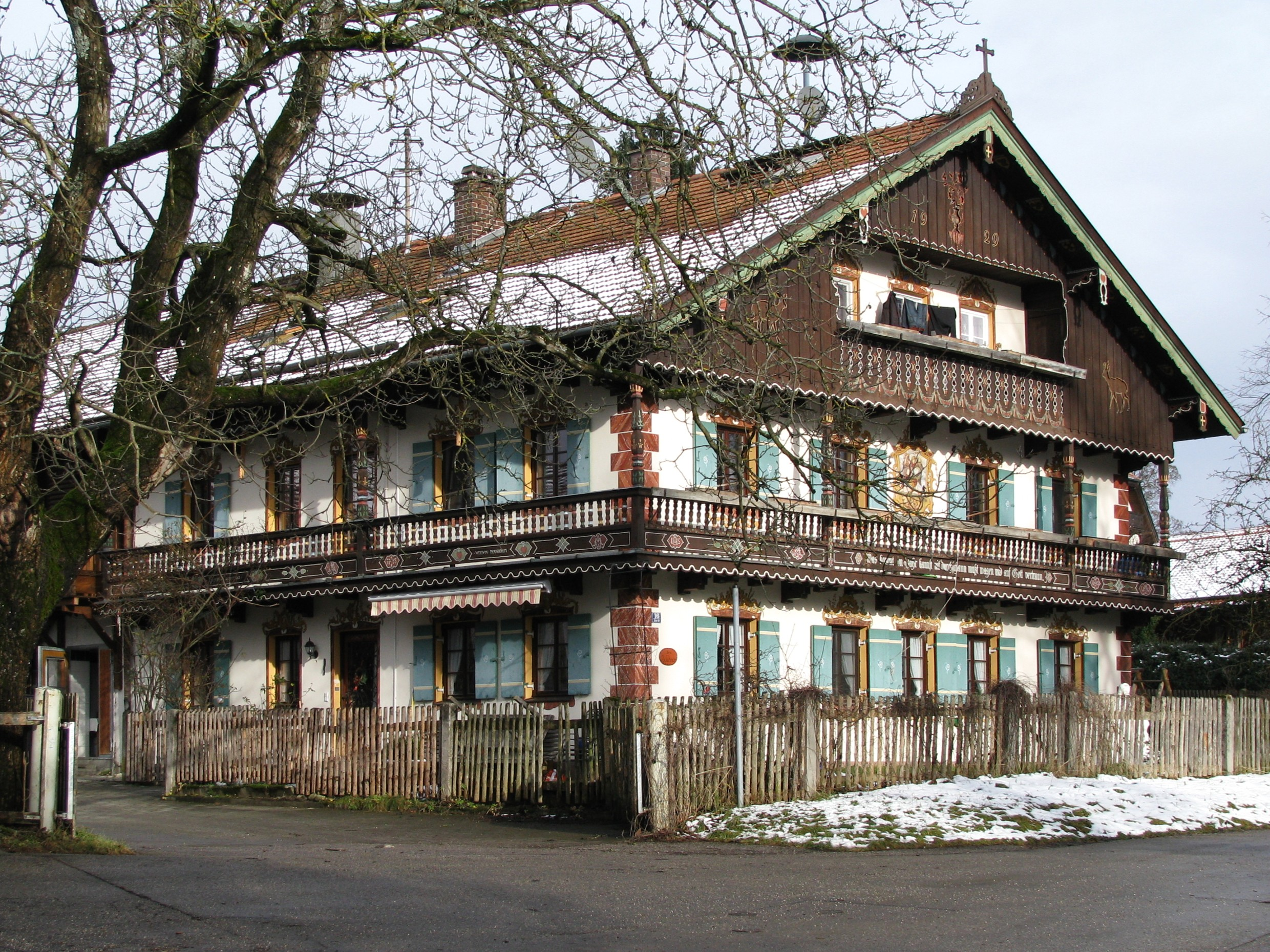 Zeller Straße 16; Hakenhof, sog. Wehnerbauer, zweigeschossiger Massivbau mit Laube und Hochlaube, reicher Bemalung und Aussägearbeiten, im Heimatstil, bez. 1929.; Gemeinde Schäftlarn